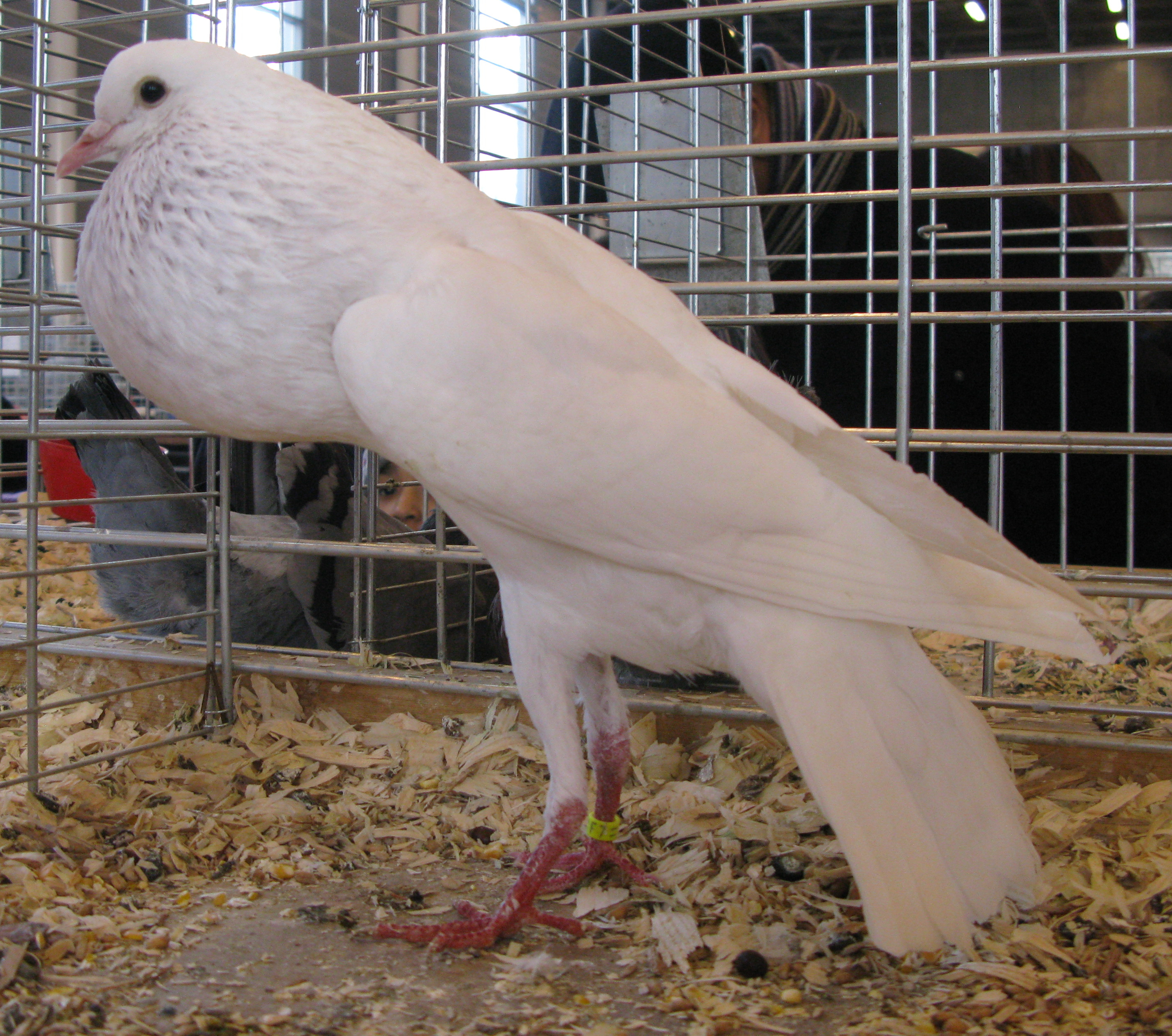 Un pigeon biset (columba livia) blanc, de variété boulant brünner, au salon de l'agriculture de Paris.